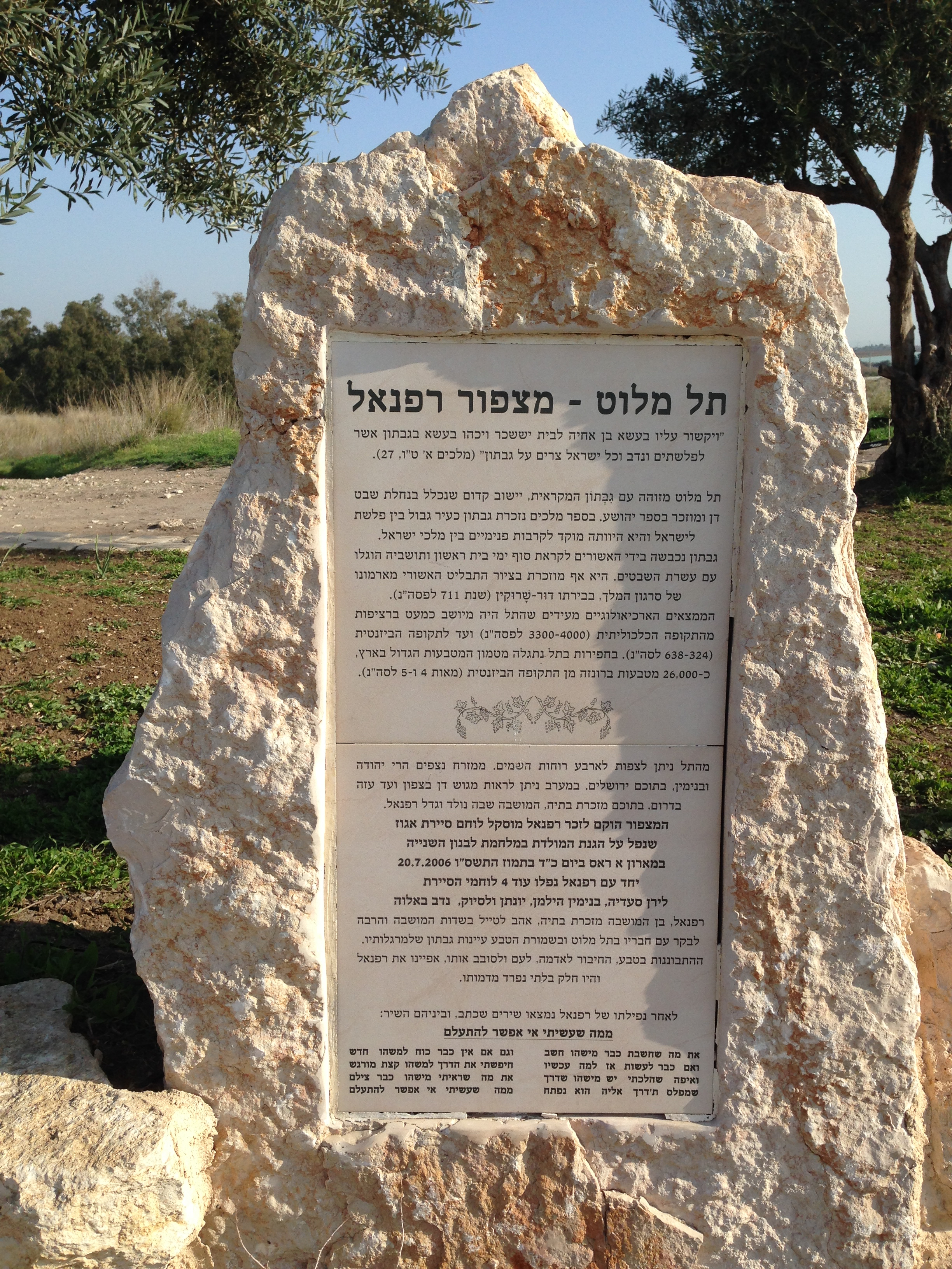 השלט בתל מלוט, מעל עיינות גבתון